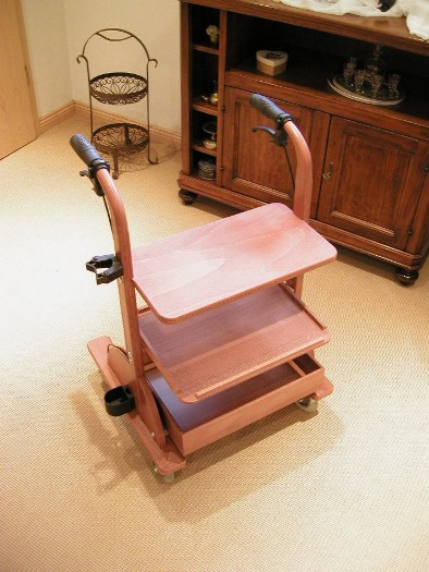 Haus-Rollator aus Holz im Farbton Nussbaum mit Tablett, Kasten und Stockhalter